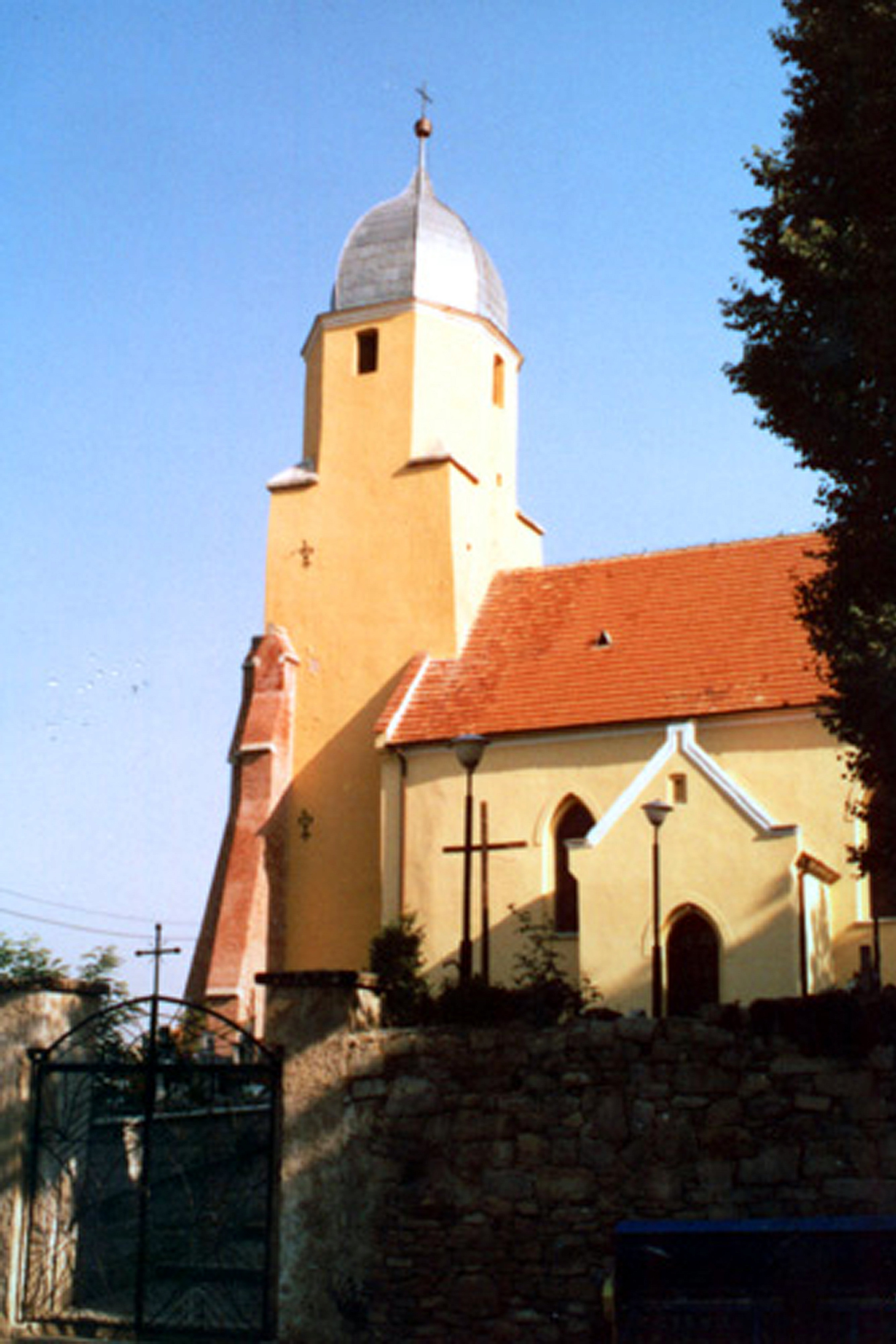 Kosciol pod wezwaniem sw. Jadwigi w Targoszynie, wyglad z zewnatrz. date:2000